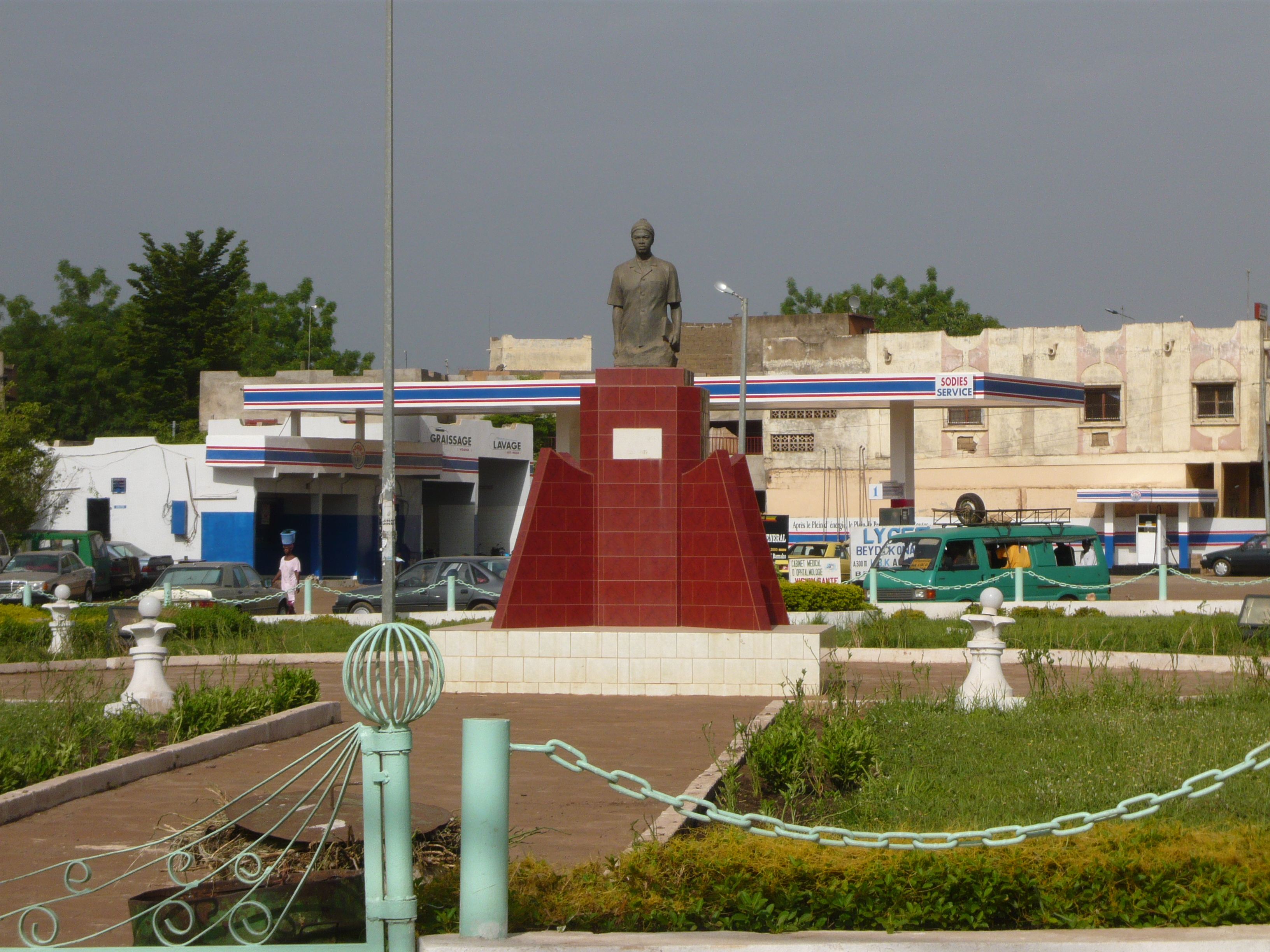 Place Abdoul Karim Camara dit Cabral, Hamdallaye - Bamako, Mali